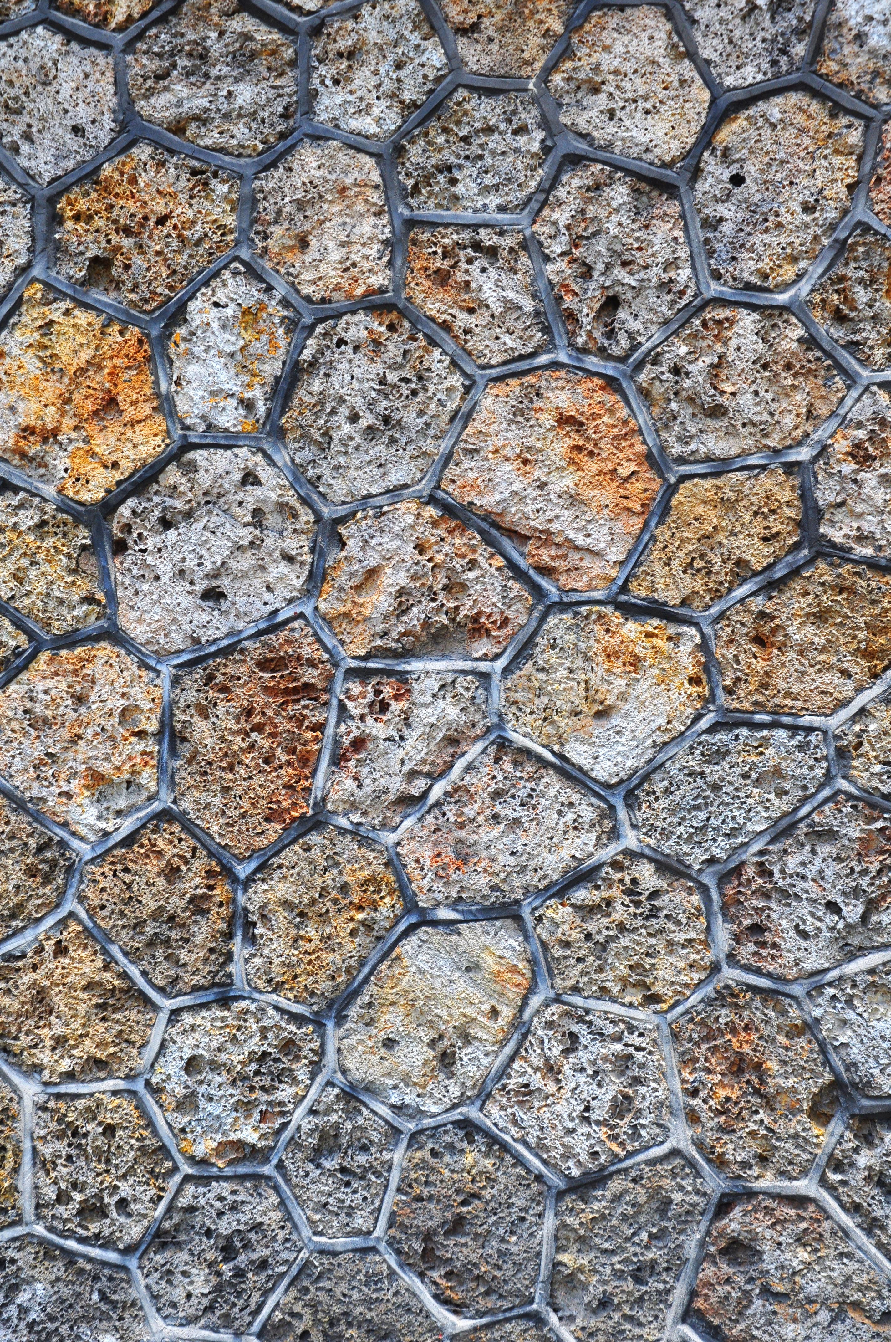 mur en pierre meulière, rue de la Chine, Paris